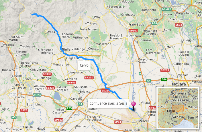 Carte d'après openstreetmap This map may be incomplete, and may contain errors. Don't rely solely on it for navigation.